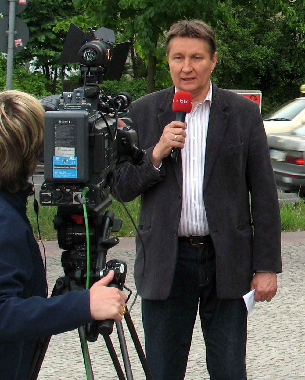 Ulli Zelle berichtet in der Abendschau über den Großbrand auf dem Dach der Berliner Philharmonie Berlin, 20. Mai 2008